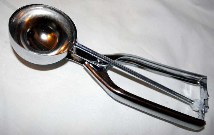 ijslepel (Eigen werk)